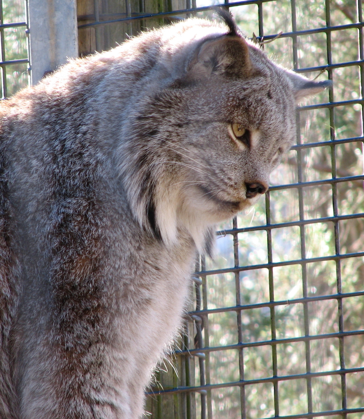 Lynx